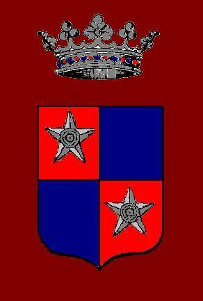 Armoirie créée par Caillotduval, avec paint.